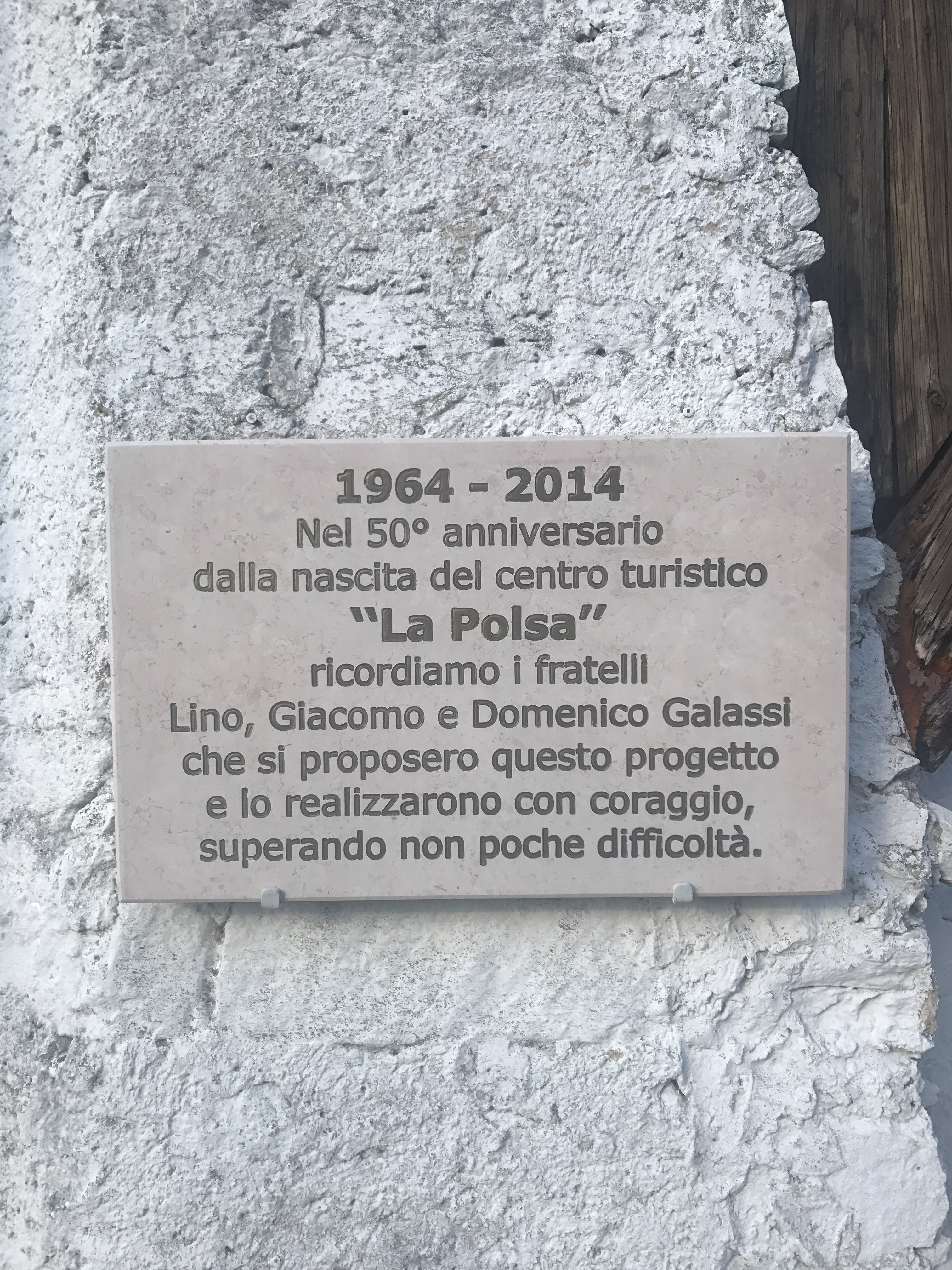 Targa nella piazza principale del paese